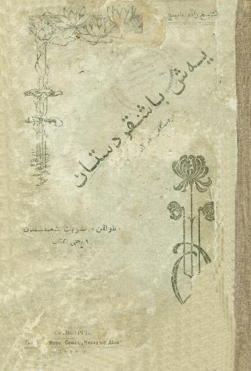 Башҡортса: Шәйехзада Бабичтың "Йәш Башҡортостан" исемле иҫке башҡорт телендә 1918 йылда Ырымбурҙа баҫылып сыҡҡан китабы.